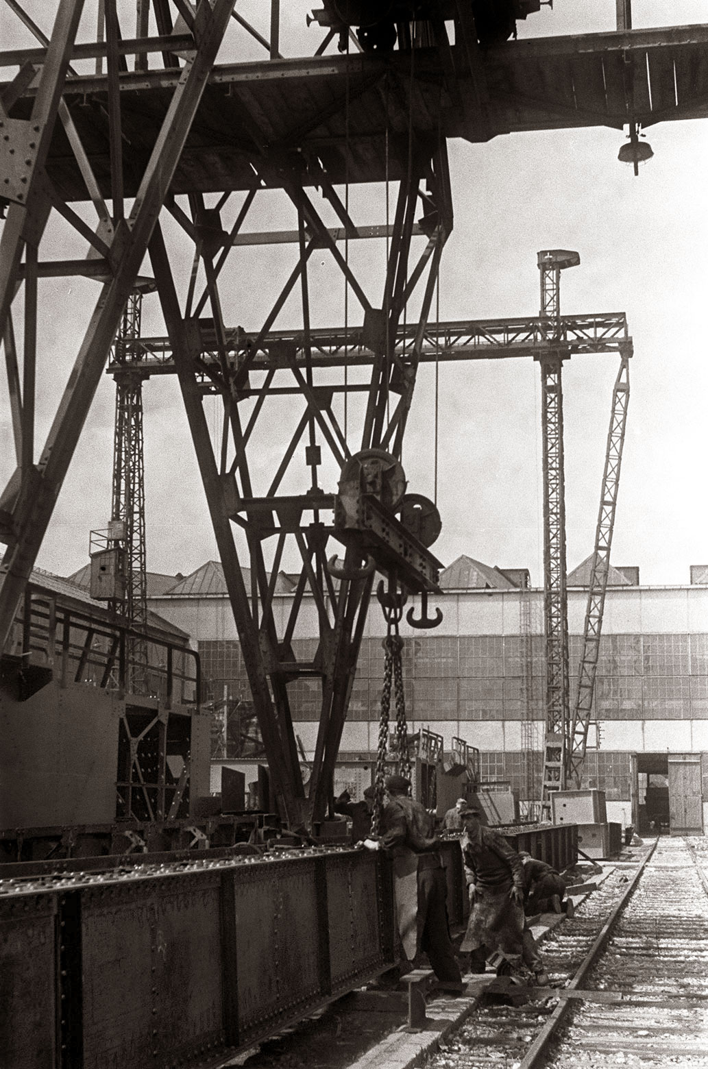 Metalna